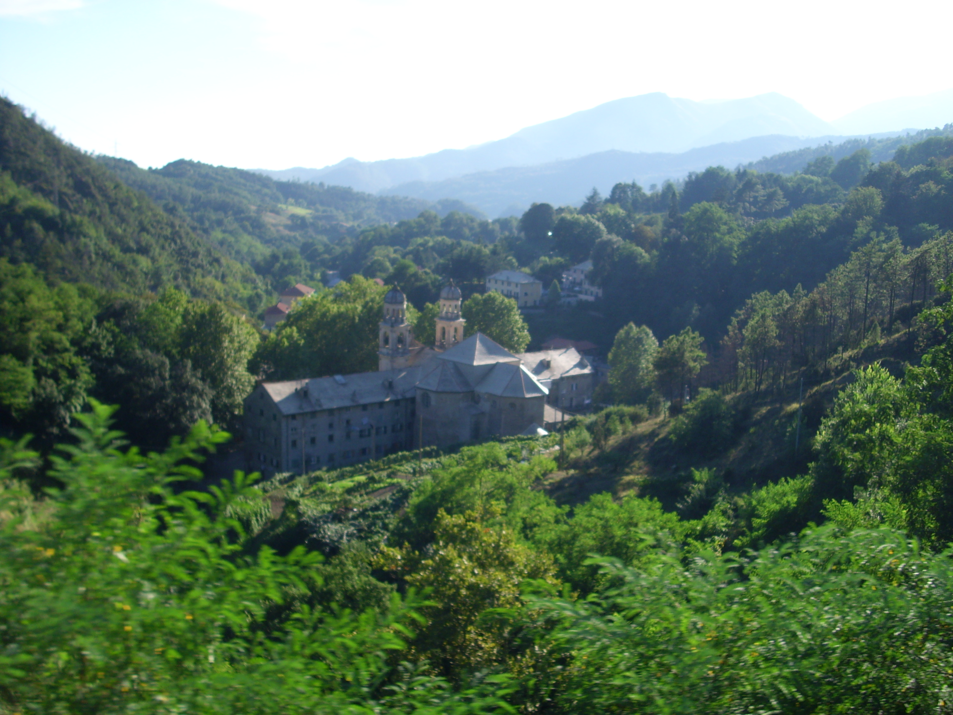 Santuario dell'Acquasanta, a Genova, visto dalla ferrovia Genova-Ovada-Acqui Terme.